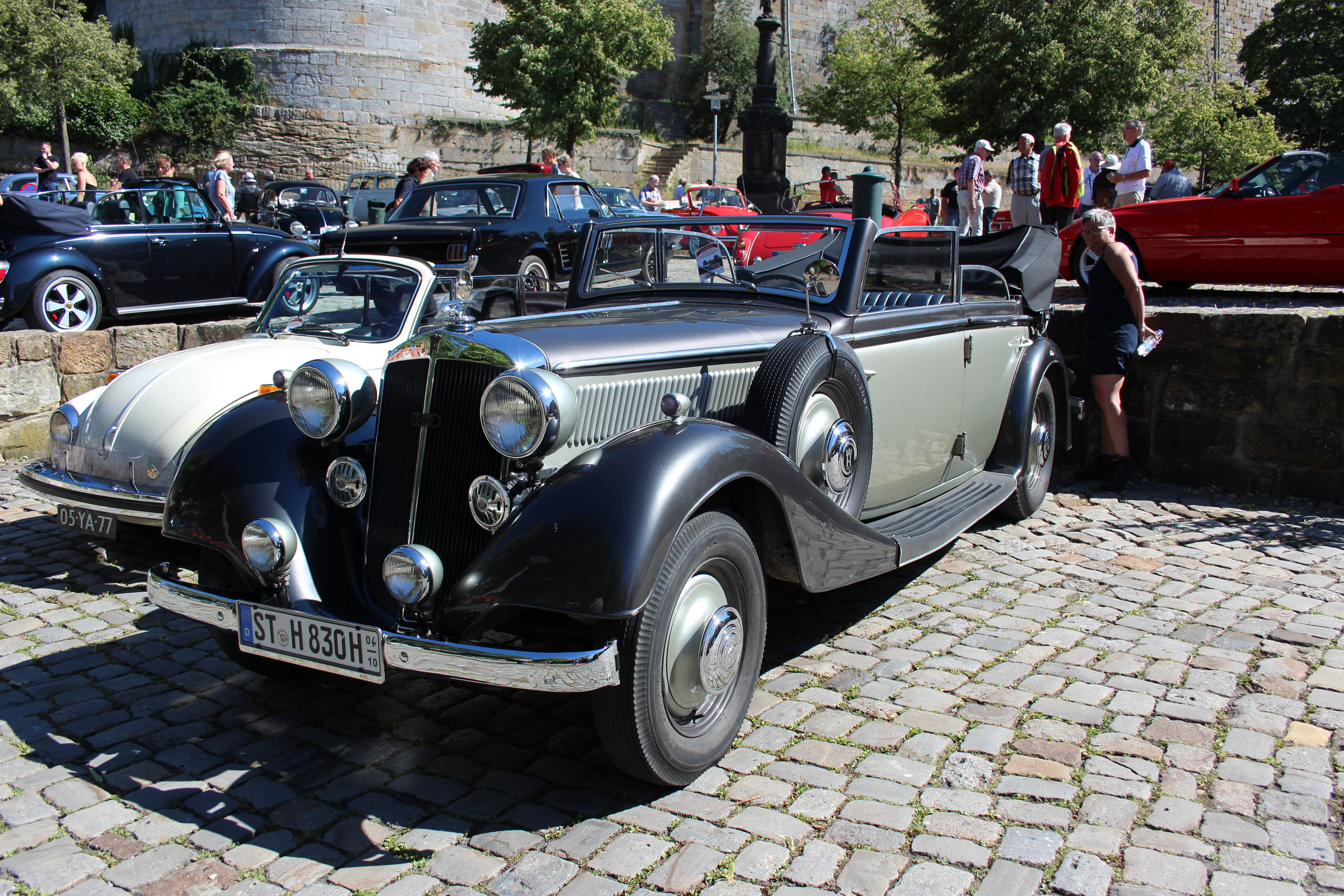 1938 Horch 830 BL Cabriolet Bad Bentheim Burg 01.07.2018